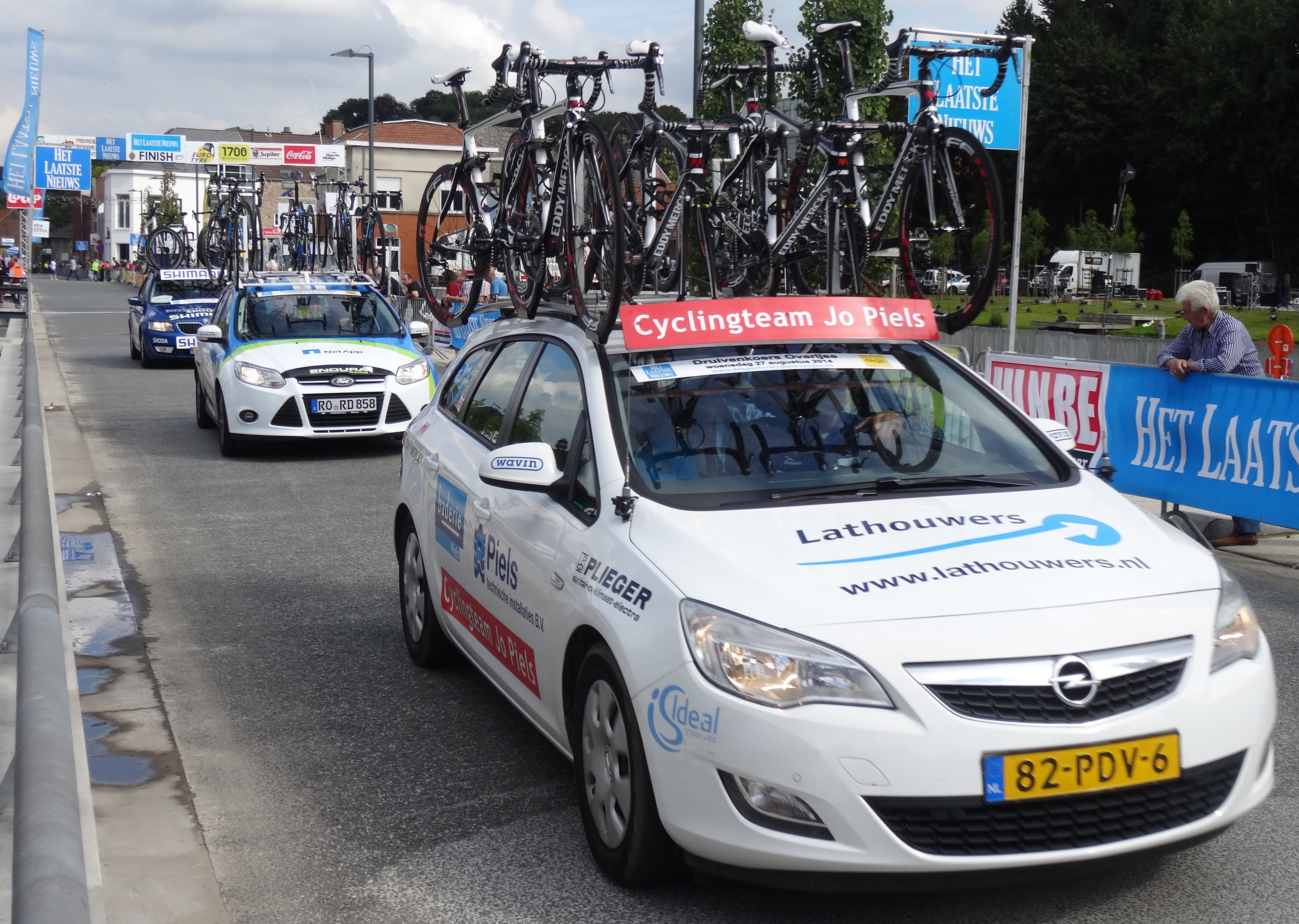 Reportage photographique réalisé le mercredi 27 août à l'occasion de l'arrivée de la Druivenkoers Overijse 2014 à Overijse, Belgique.